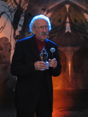 Franciszek Pieczka (b. 1928), Polish actor